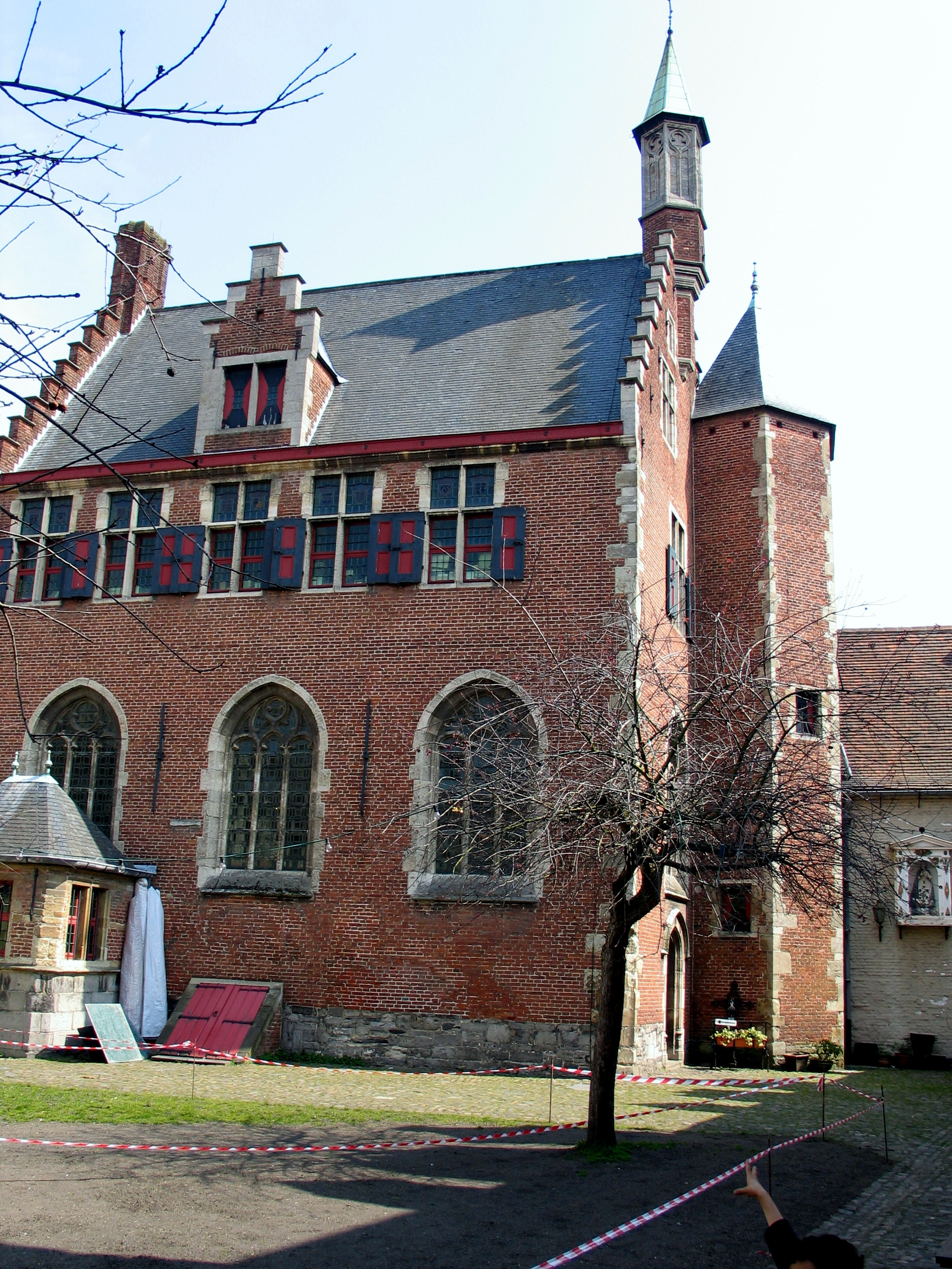 de Catharinakapel in het huis van Alijn te Gent, België